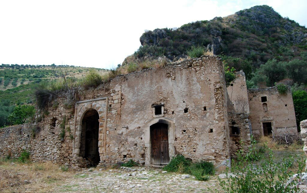 Ruderi chiesa di S.Stefano di Pulsano Complesso Paleocristiano della Sperlonga Mattinata (fg)